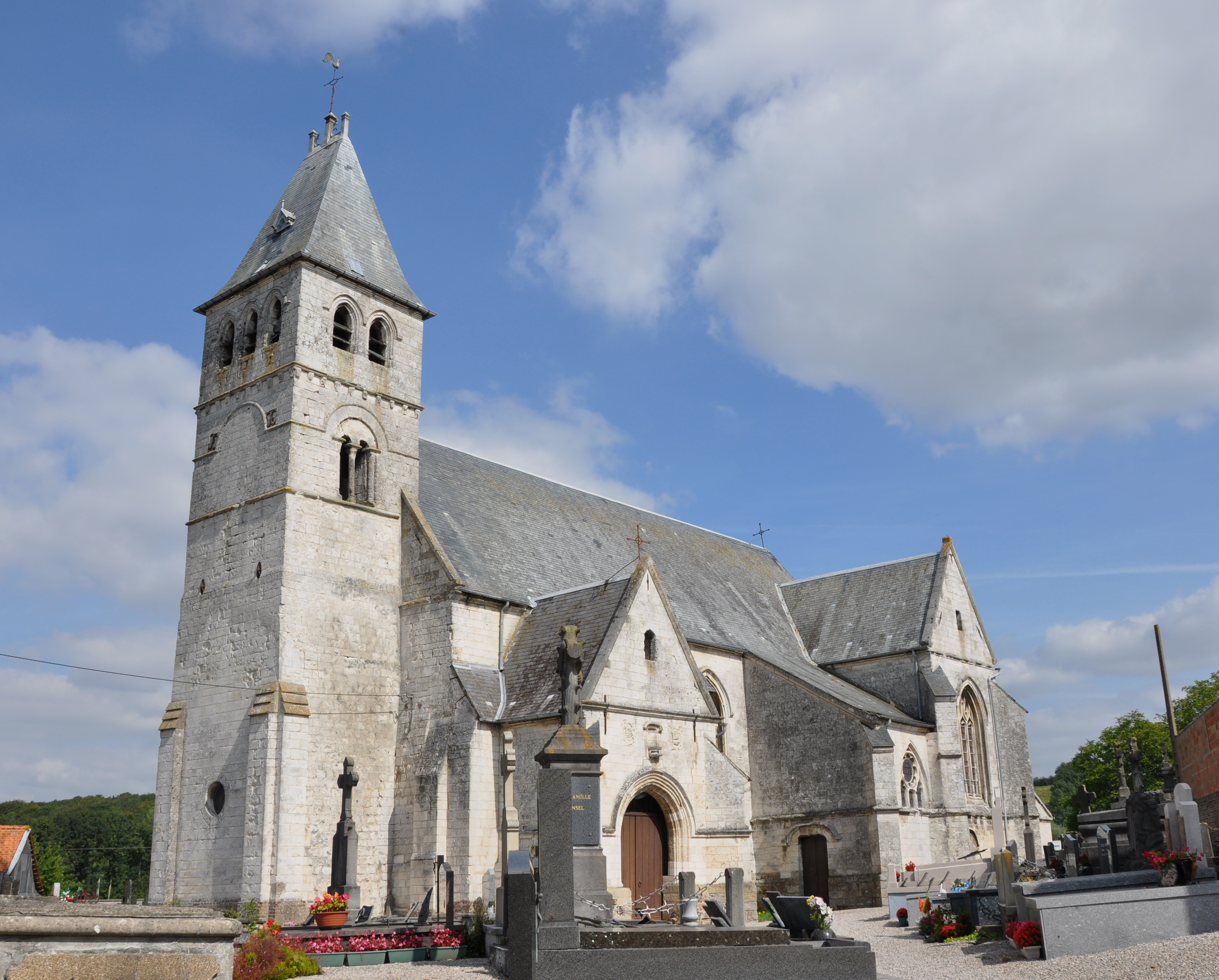 Église Saint-Martin de Fléchin, (Inscrit, 1926) .